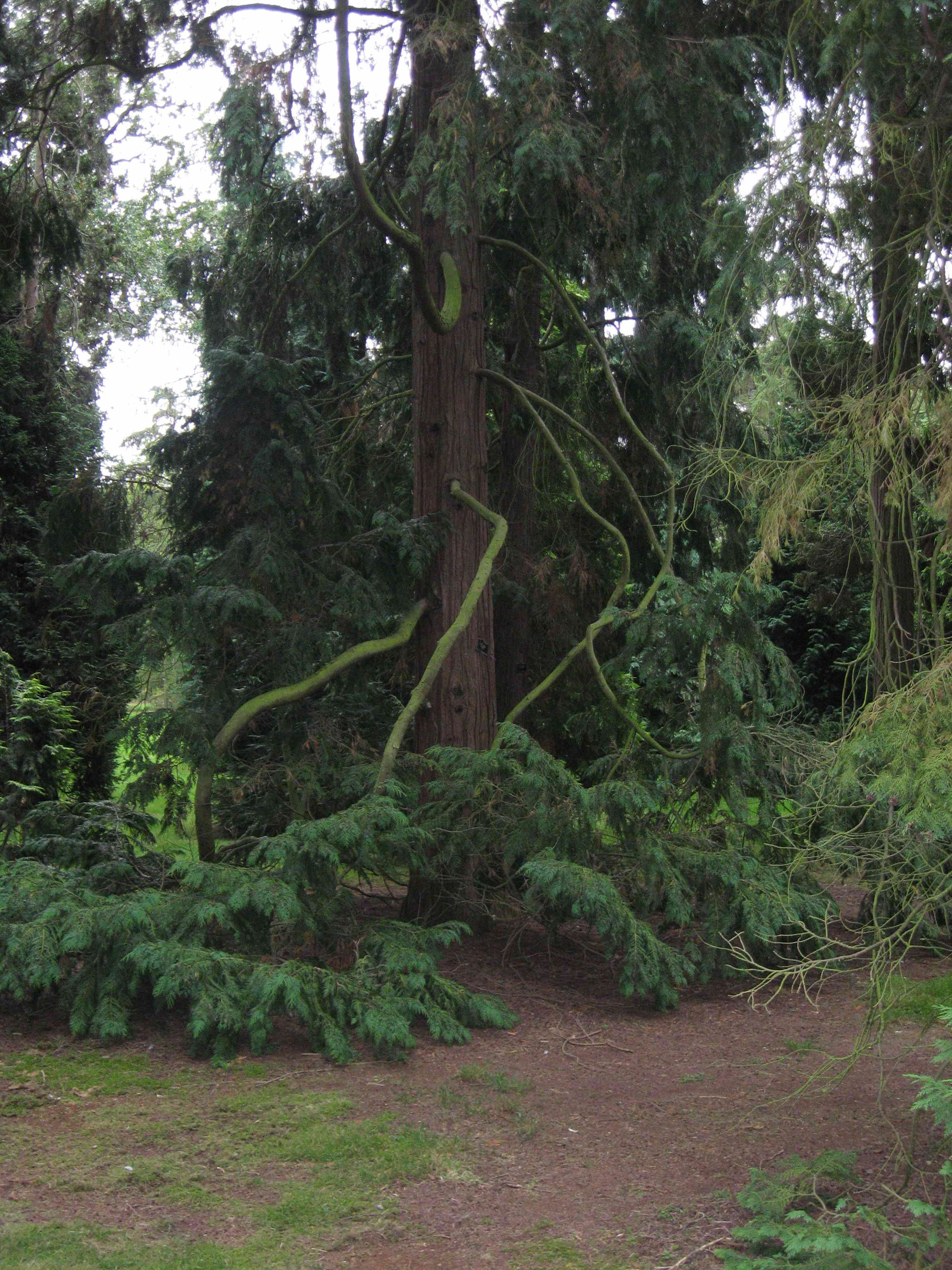 Kew Arborétum